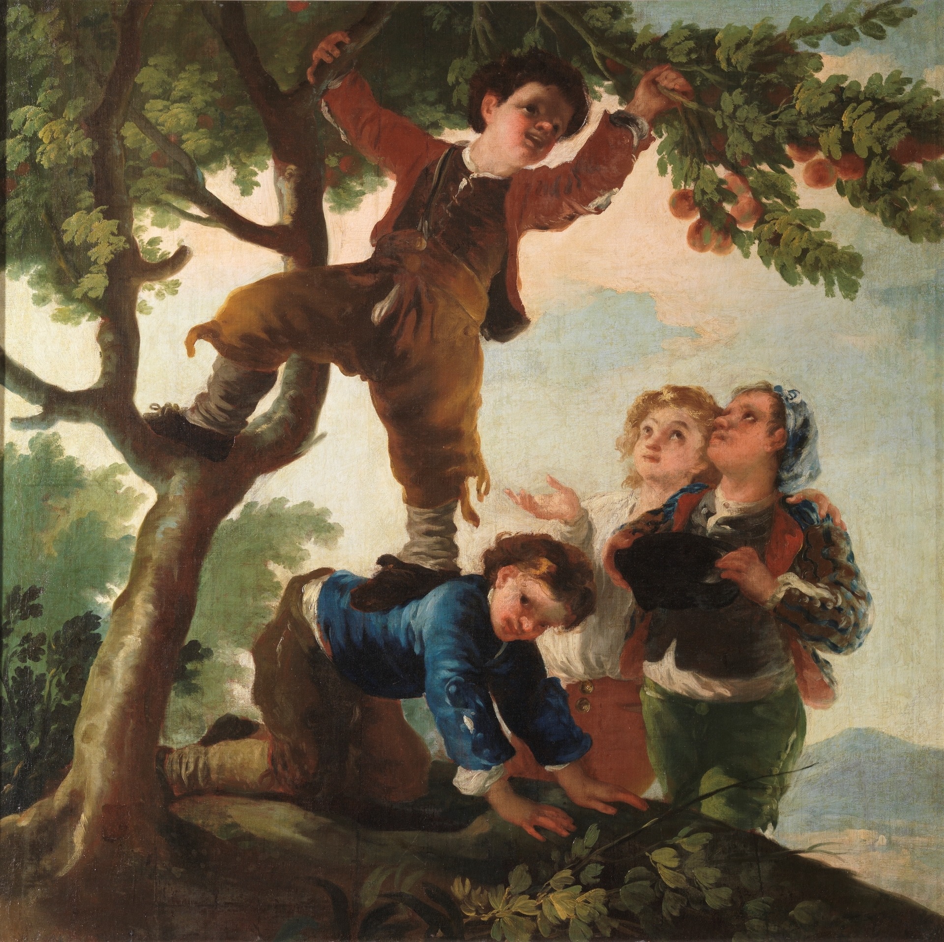 Muchachos cogiendo fruta.label QS:Les,"Muchachos cogiendo fruta."